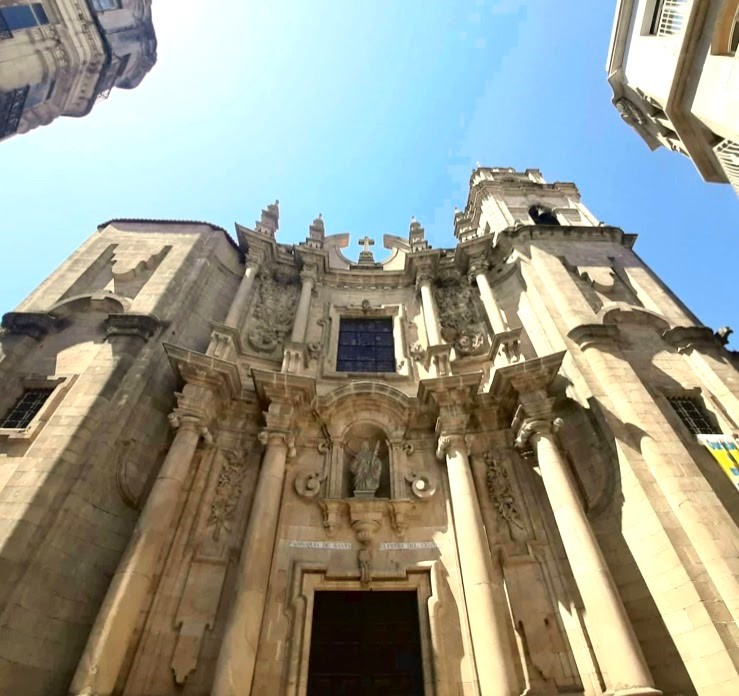 Iglesia de Santa Eufemia (Ourense)